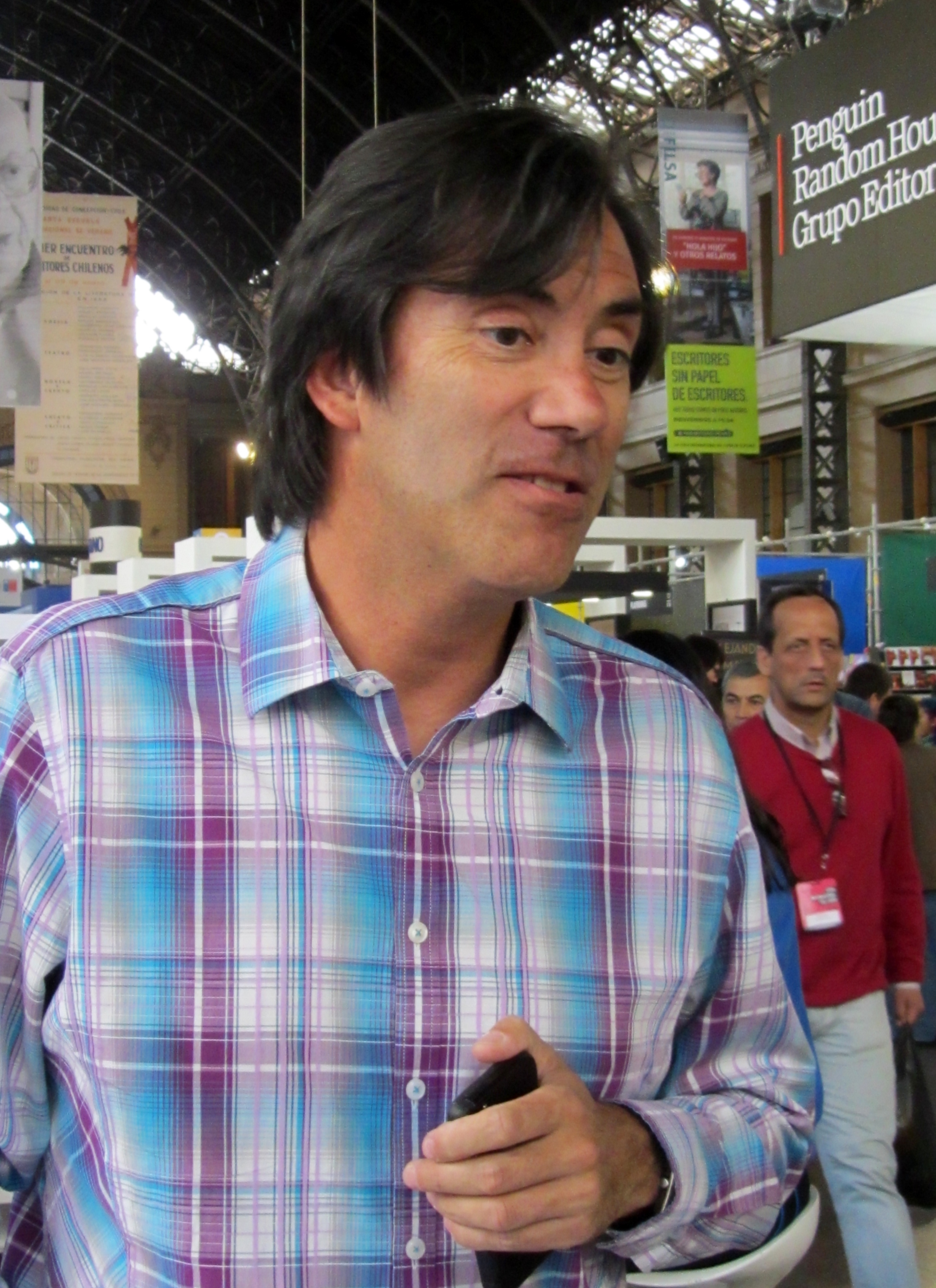 El escritor chileno Waldo Parra en la Feria Internacional del Libro de Santiago 2016